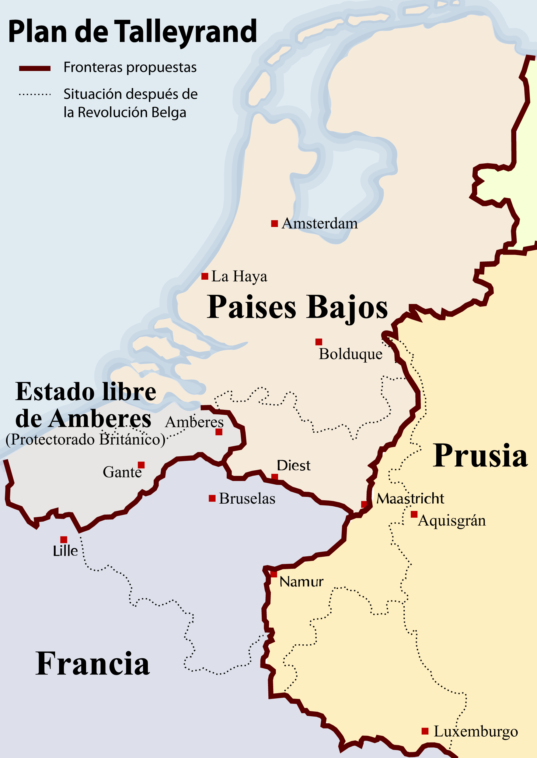 Mapa donde se refleja el plan del embajador francés Charles Maurice de Talleyrand para la repartición de Bélgica tras la revolución de 1830.